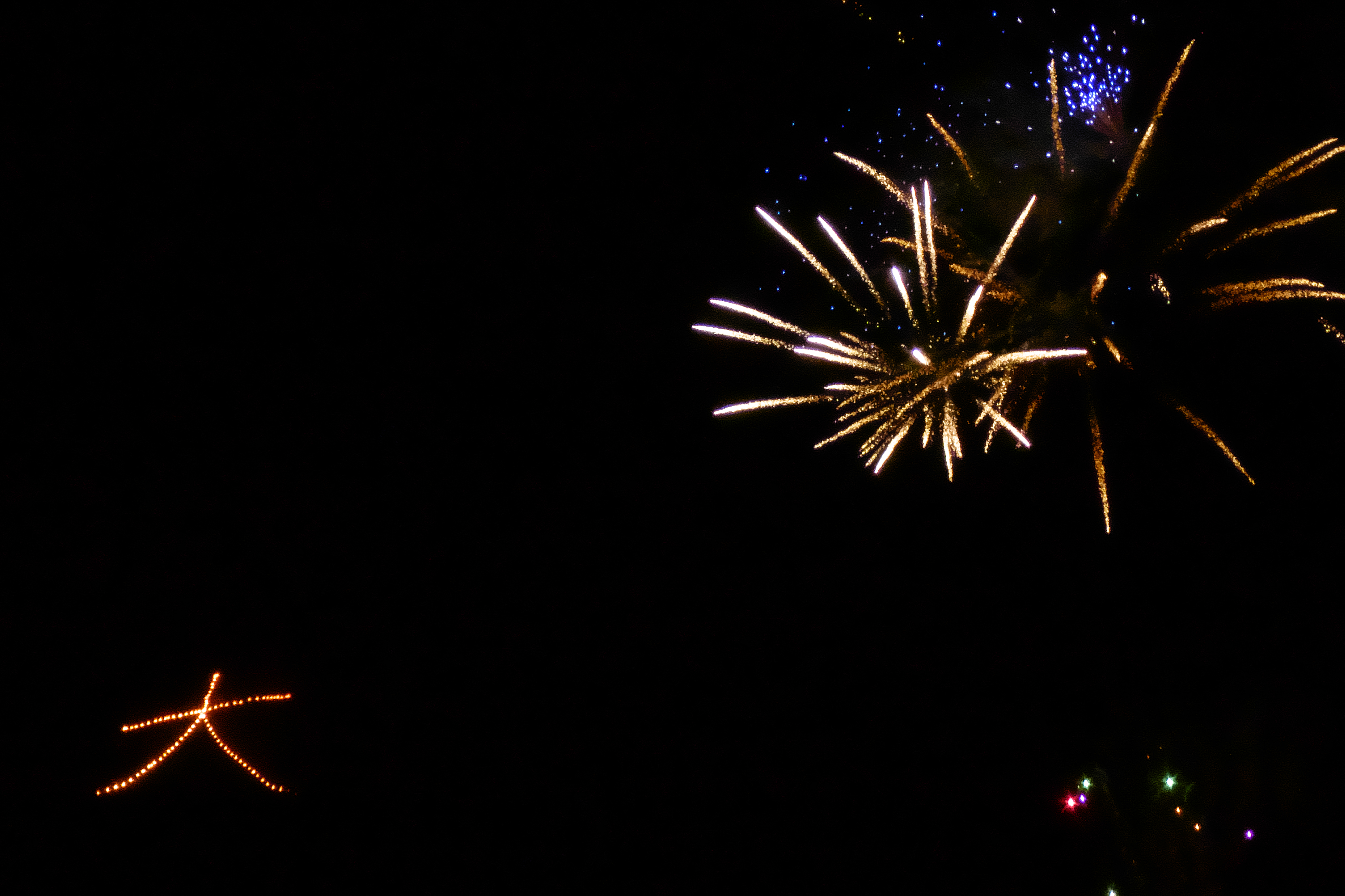 大館大文字まつり：秋田県大館市